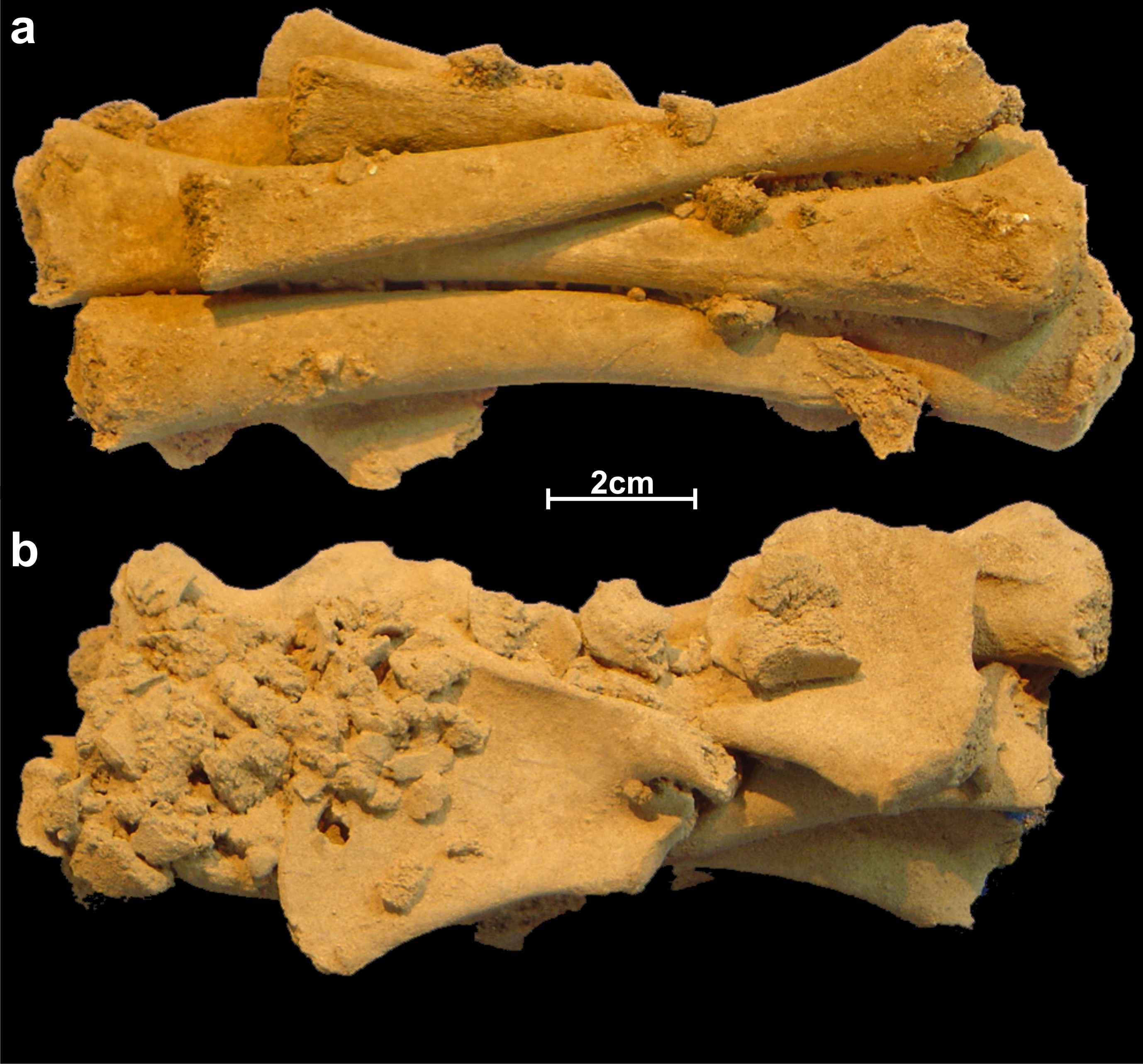 Lapa do Santo - Sepultamento 17. Vista anterior (a) e posterior (b) do fardo de ossos que é composto exclusivamente por peças ósseas de um único indivíduo subadulto. Estava ao lado do crânio do indivíduo adulto.